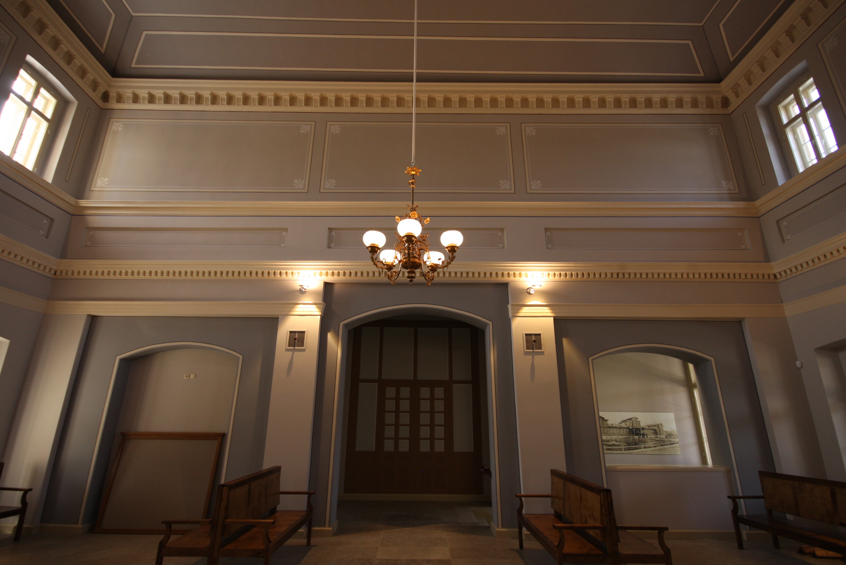 Tartu raudteejaama renoveeritud ootesaal, 24.07.2012. Foto: Indrek Mustimets.